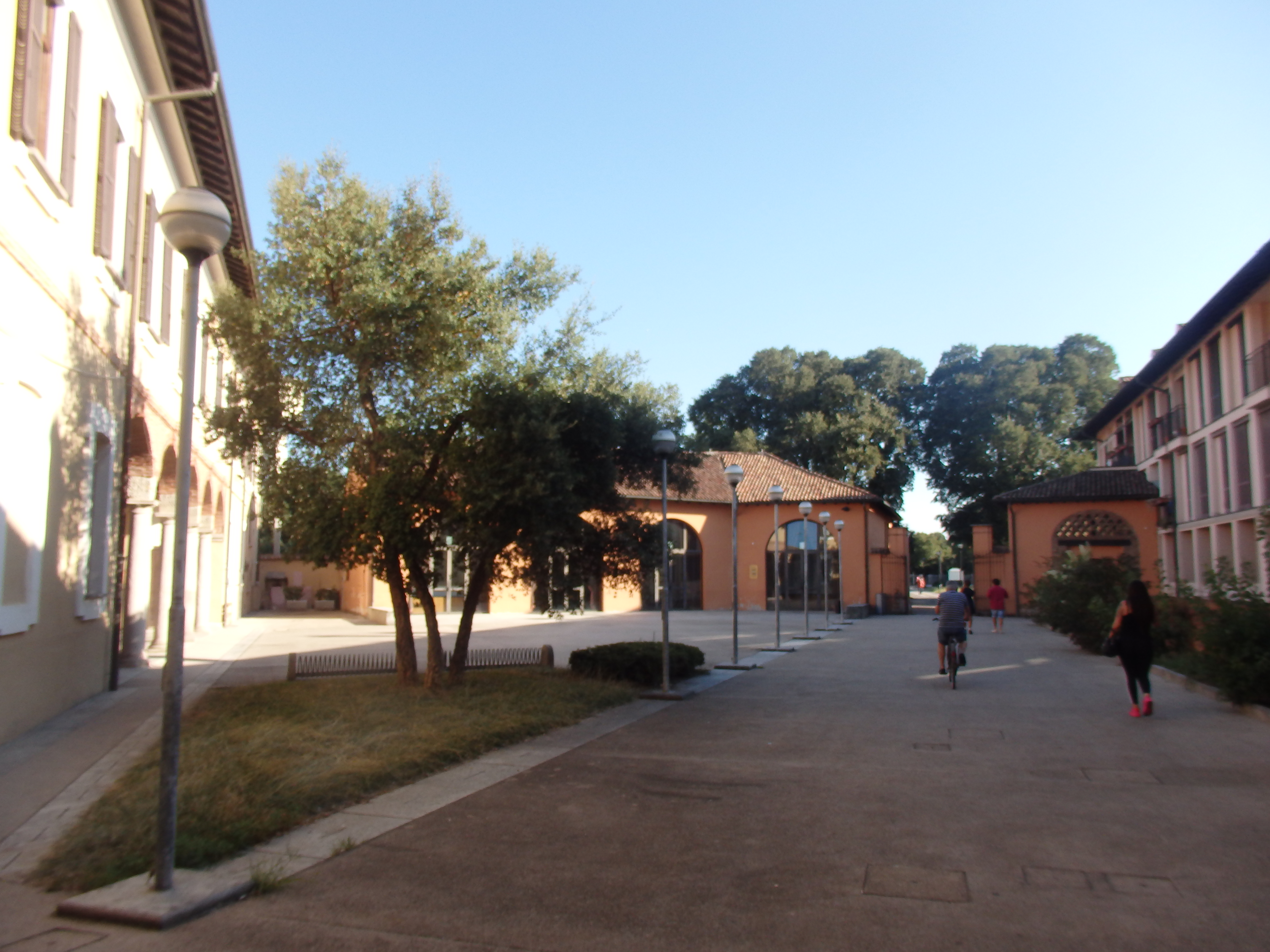 Cortile interno di villa Marazzi a Cesano Boscone